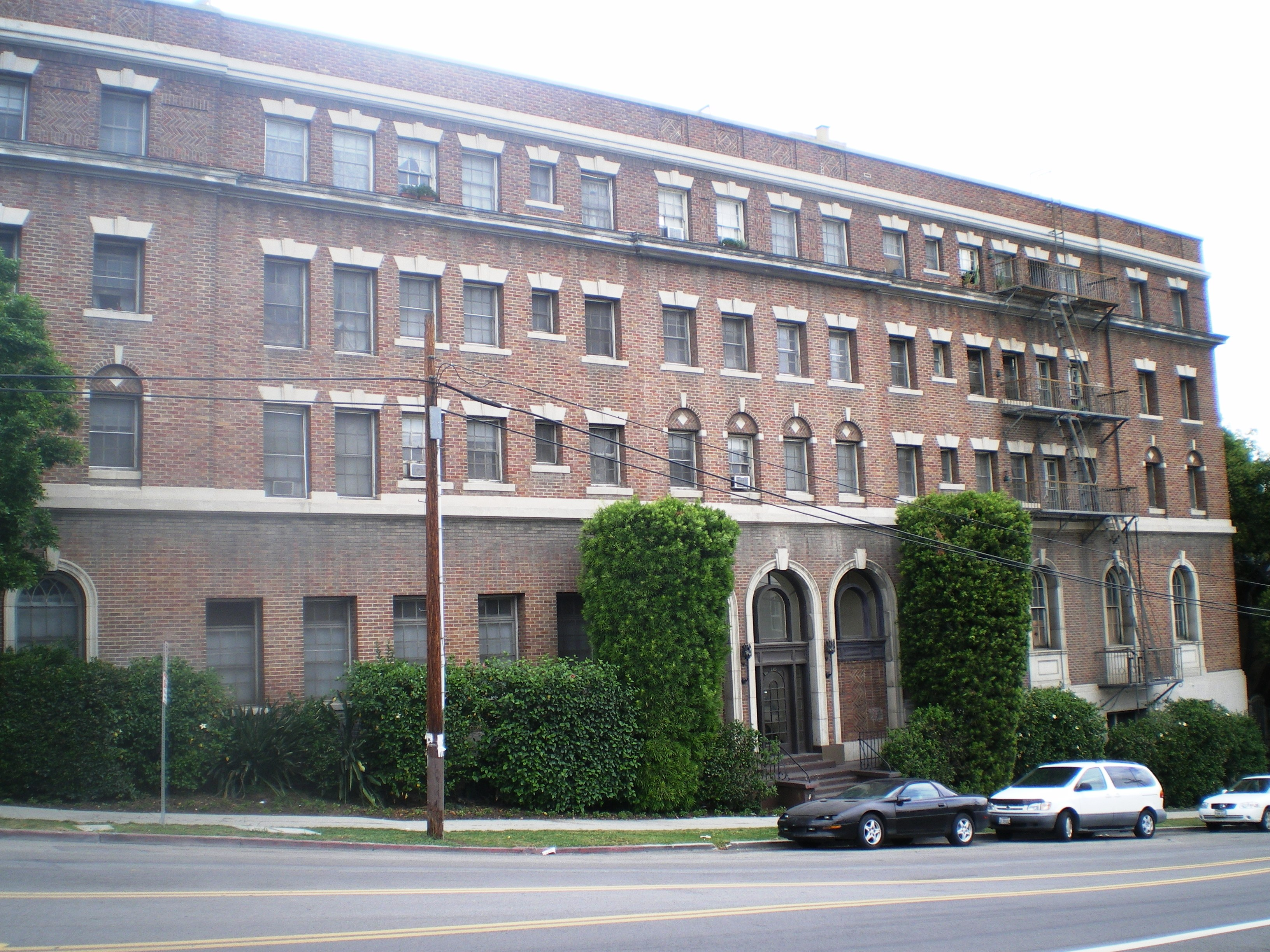 Los Angeles Nurses' Club, 245 S. Lucas Ave., Los Angeles, California